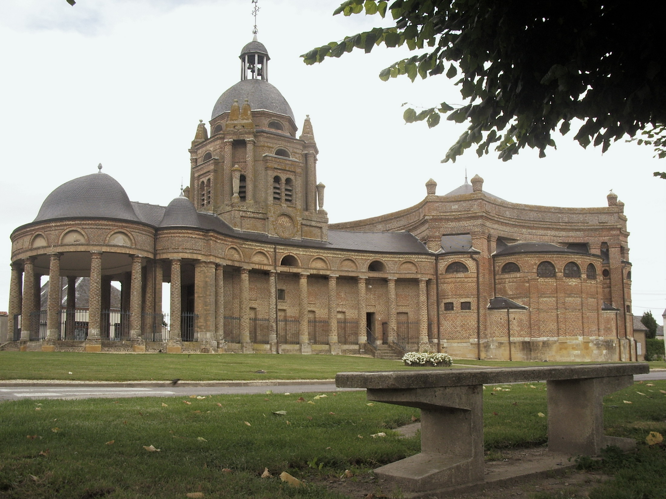 église d'Asfeld [Ardennes françaises(sud-ouest)], XVII°siècle, style baroque, à la forme d'une viole